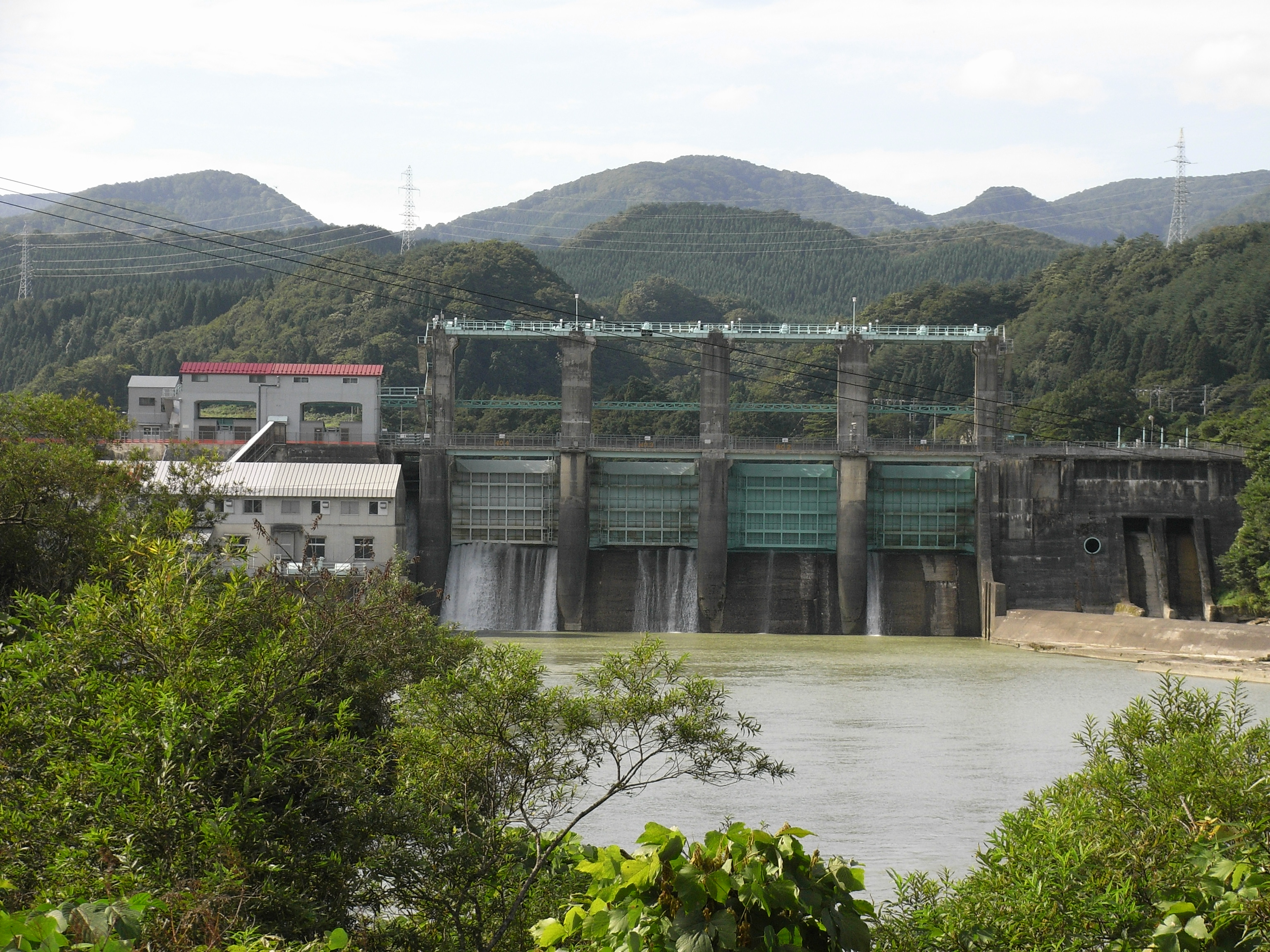 Dam